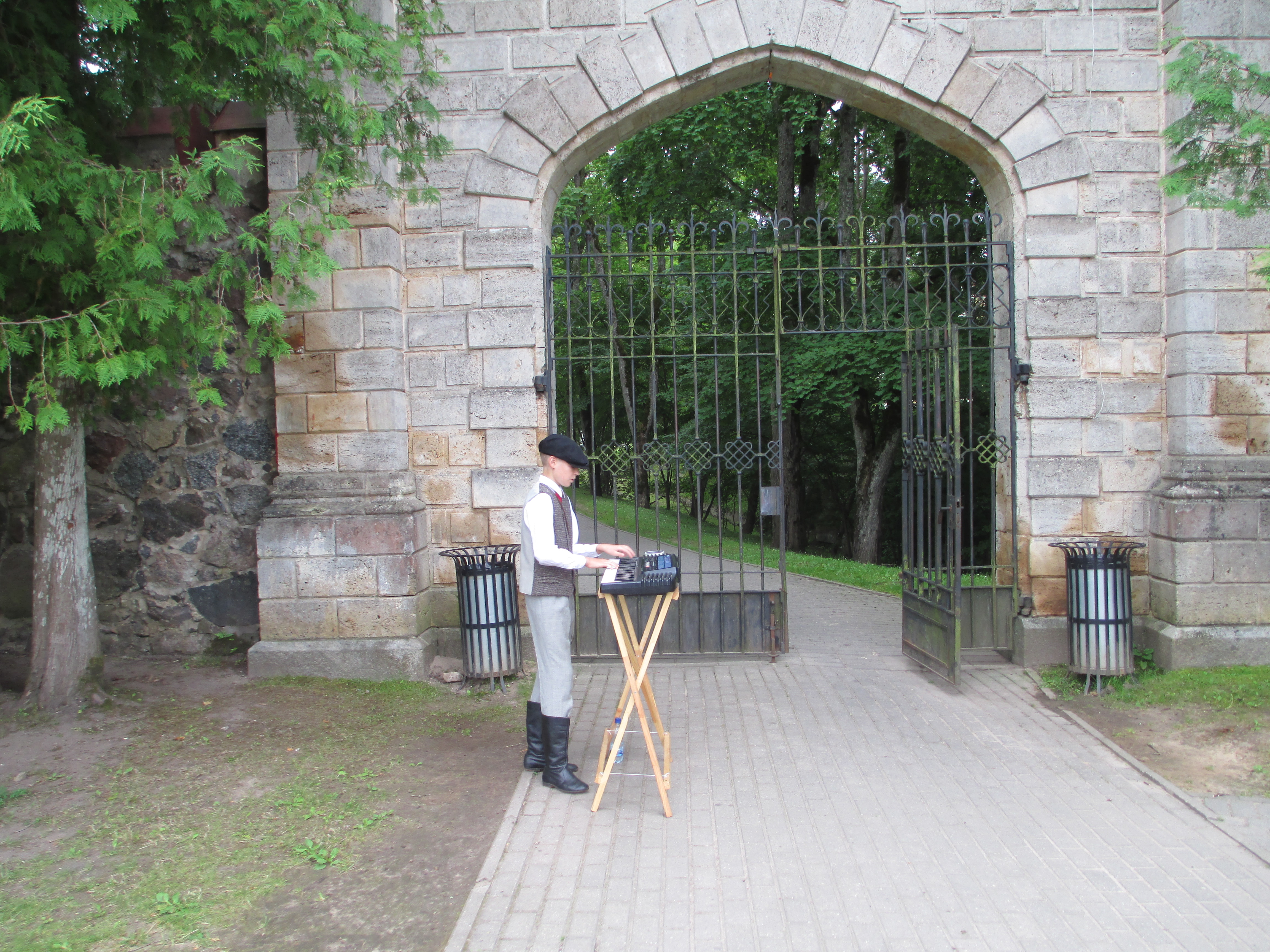 הכניסה לטירת סיגולדה